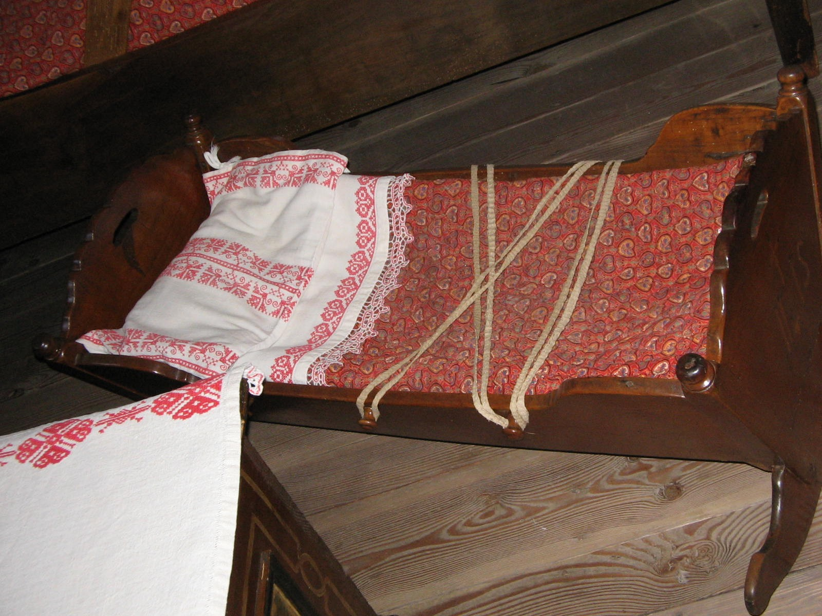 Zibelka v Prešernovi rojstni hiši v Vrbi na Gorenjskem. Quelle: eigene Aufnahme 19 08 2005 Fotograf: Janez Novak, Ljubljana, Slovenija